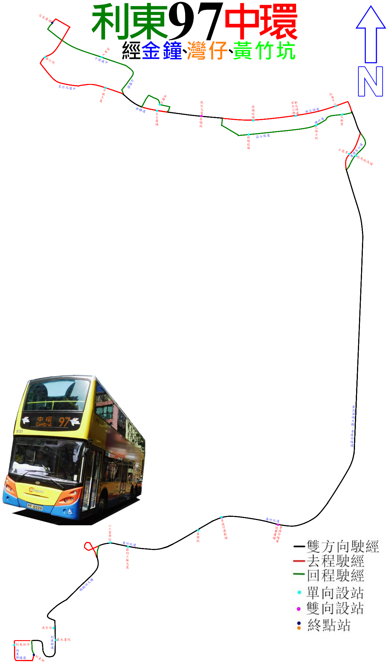 中文（香港）: 城巴97線的走線圖